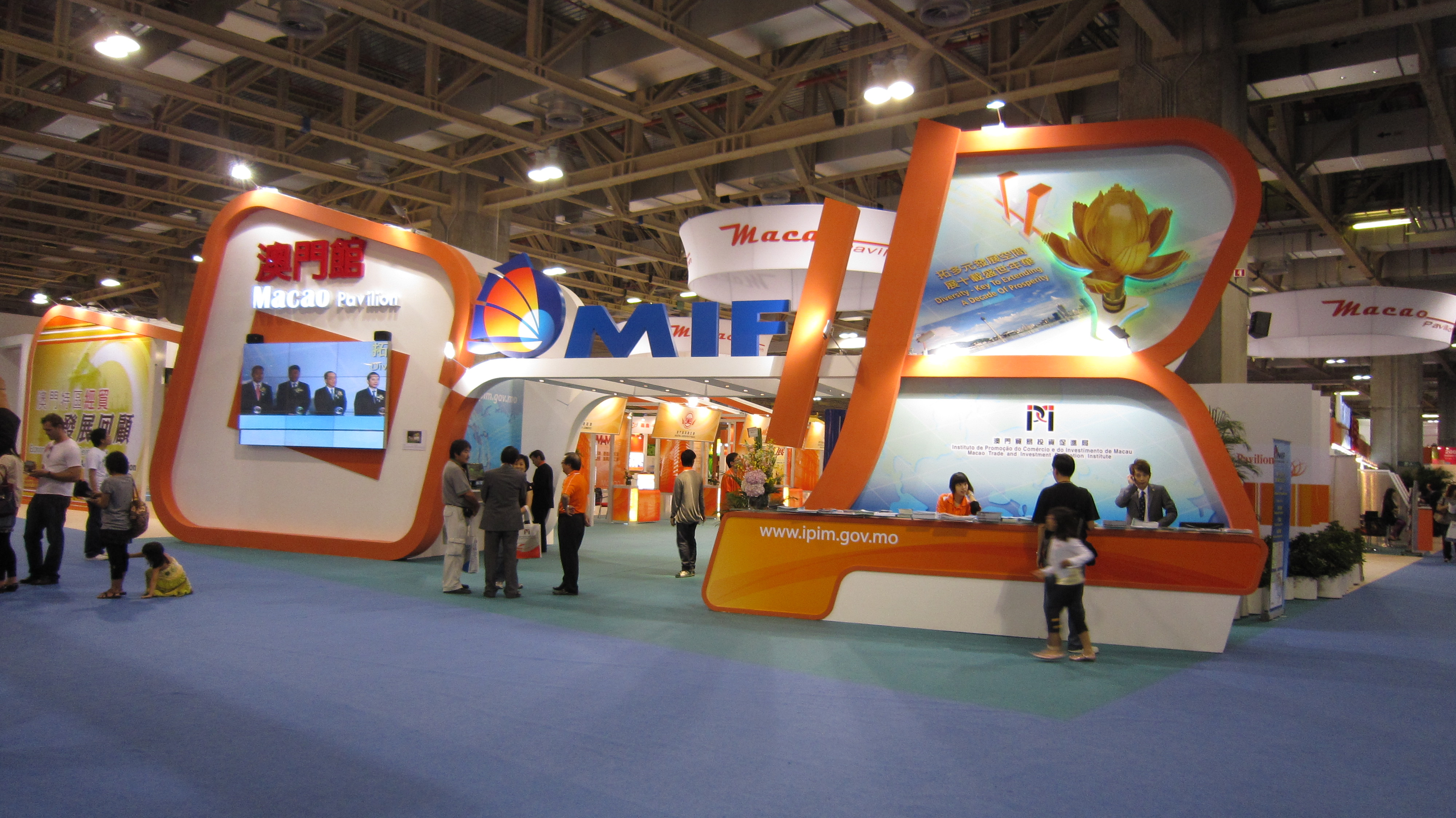 14ª Feira Internacional de Macau - pavilhão de Macau